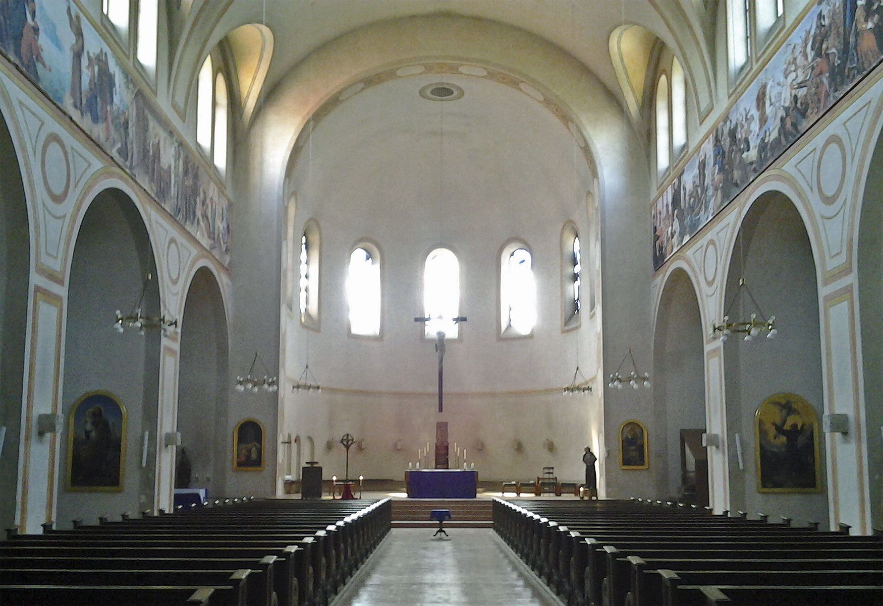 St. Anton München Innen